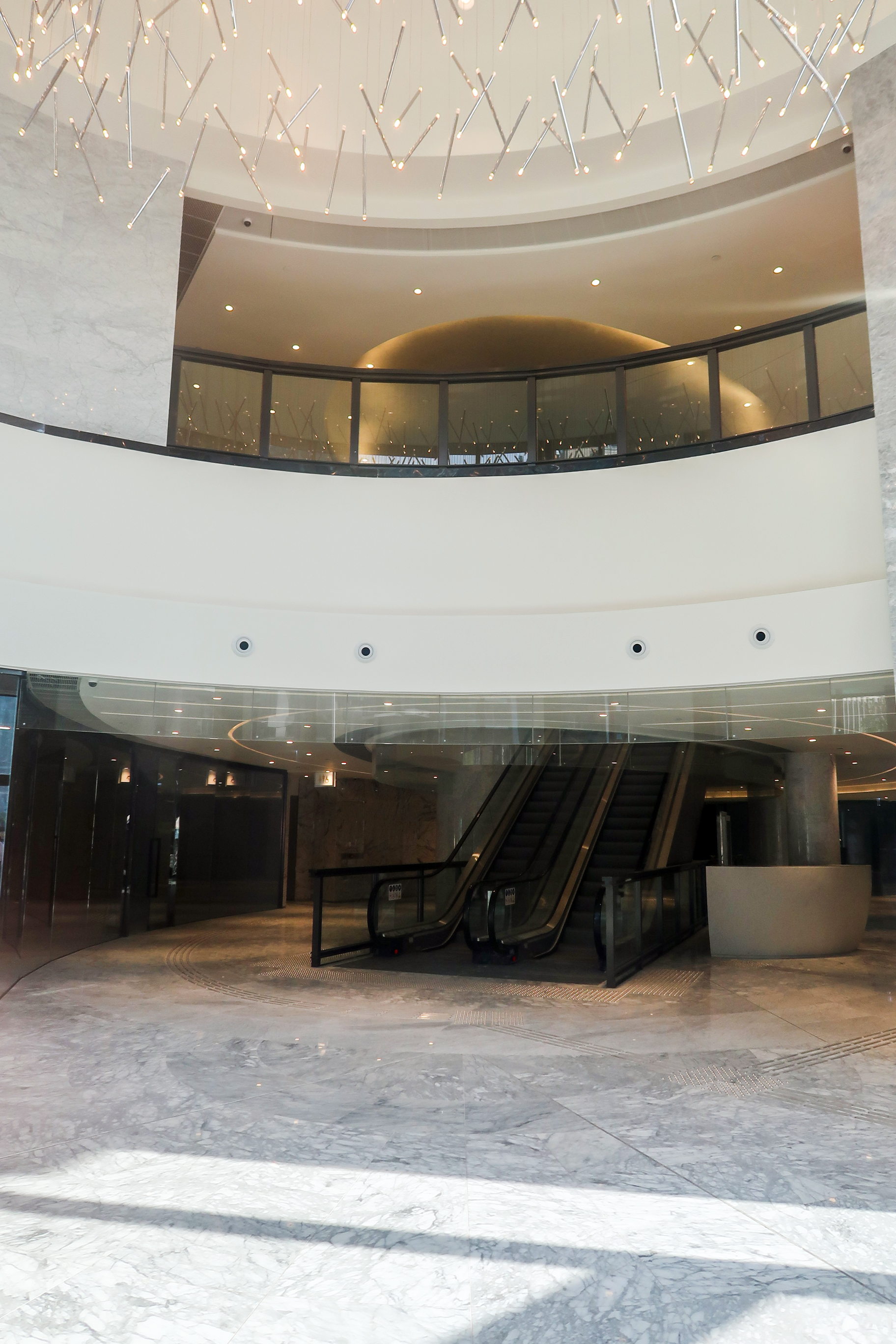 MONTEREY Place Entrance